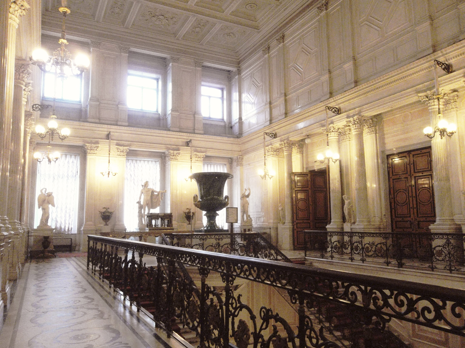 Советская лестница в Большом (Старом) Эрмитаже. Арх. Штакеншнейдер